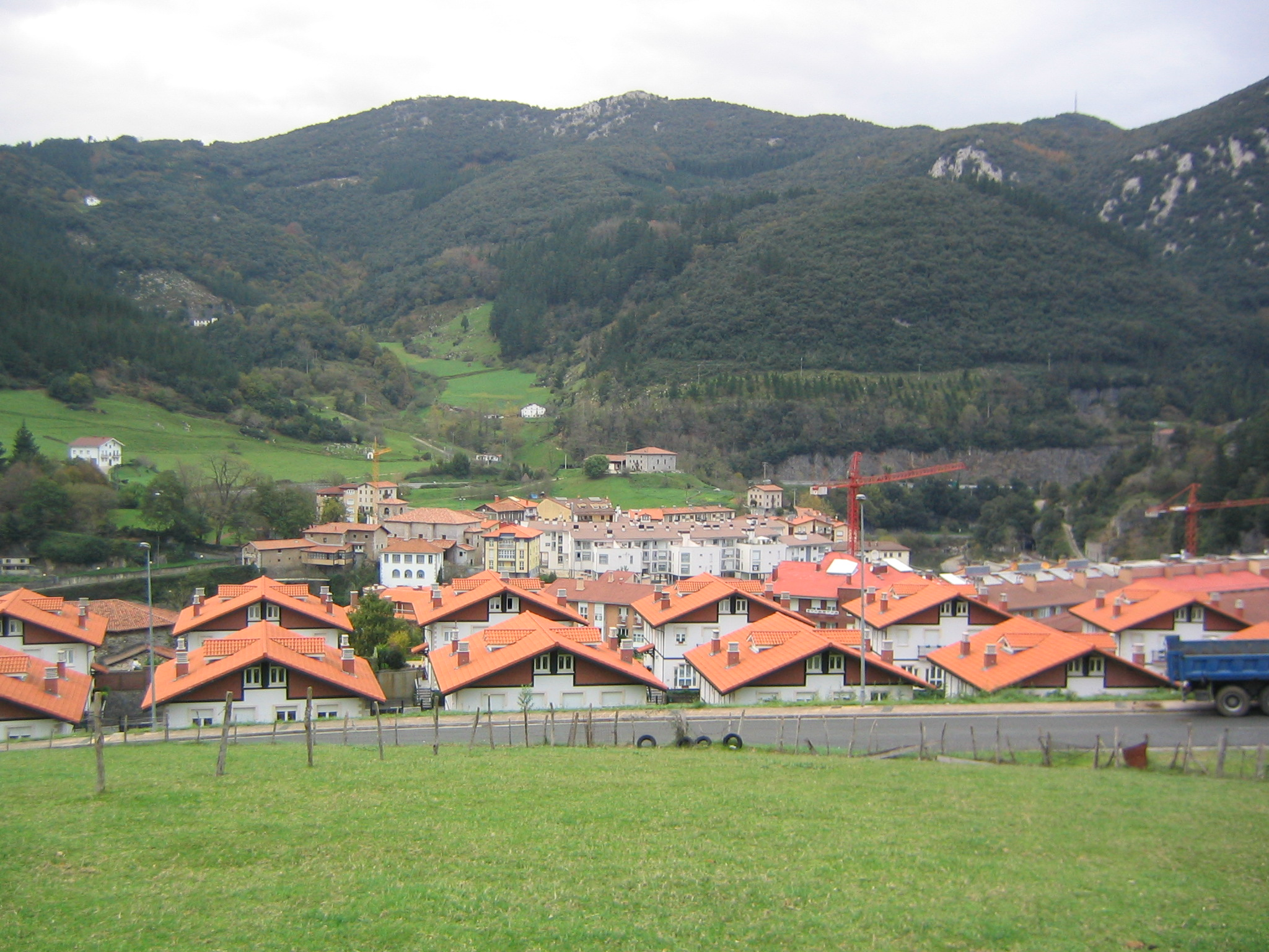 Vista parcial de Mendaro en Guipúzcoa, País Vasco, España.